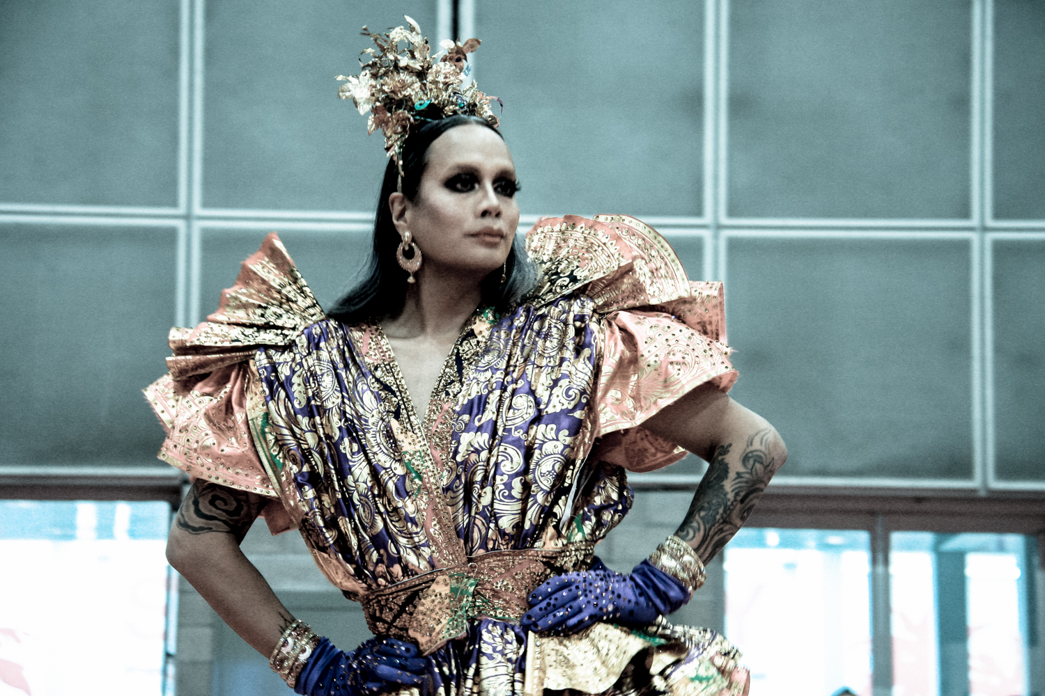 Rupaul’s DragCon LA 2019